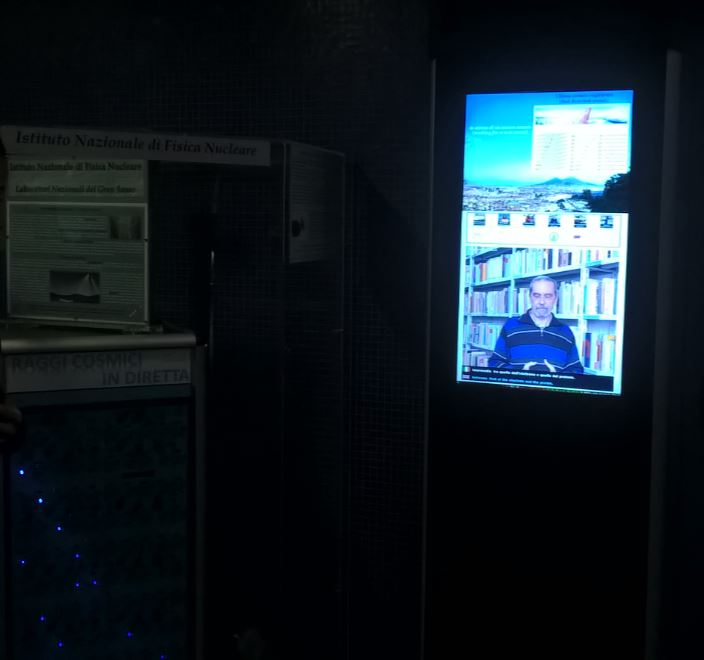 Rilevatore di raggi cosmici e totem di divulgazione scientifica presso la stazione Toledo della metropolitana di Napoli.